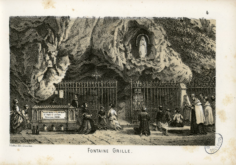 Fait partie d'un album de 18 planches lithographiées dont certaines sont signées. Pl. imprimées chez Monrocq à Paris. Titre en lettres d'or sur le plat supérieur. Les dessins des lithographies n° 5, 6, 7, 13 paraissent signés André Gorse. L'identification est certaine car le dessin original de la lithographie n°4 est signé A. Gorse. Ancely, René (1876 - 1966). Possesseur